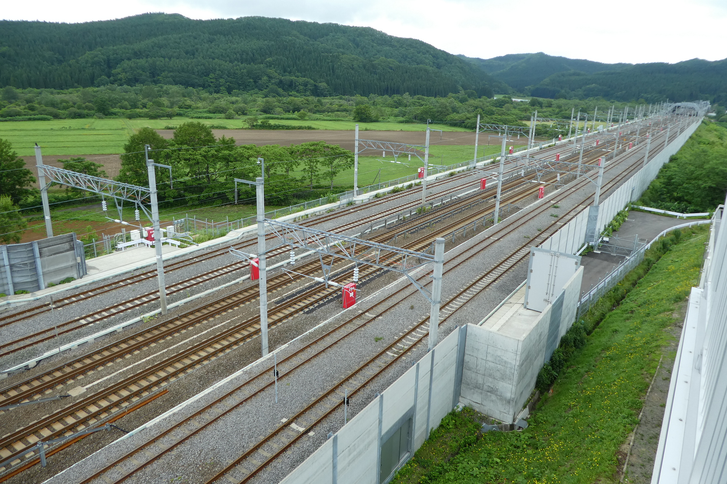 湯の里知内信号場。北海道上磯郡知内町。道の駅しりうちの新幹線展望塔より。